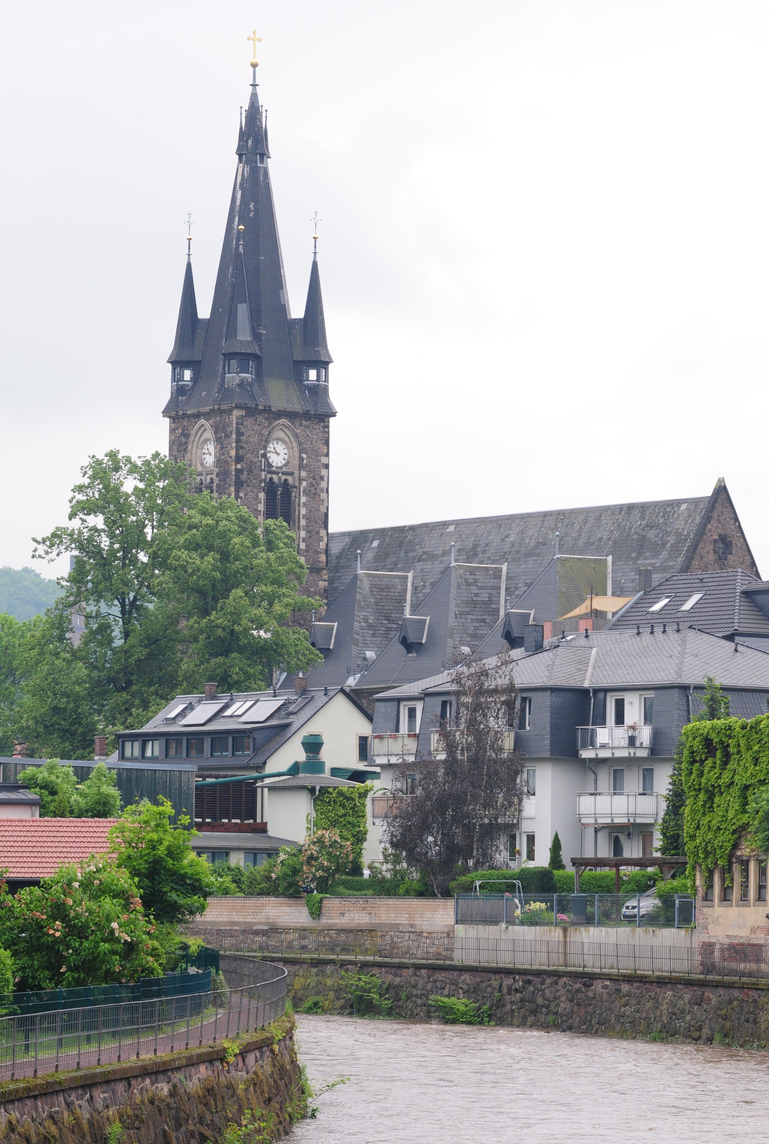 Freital-Deuben, Christuskirche (Sachsen, Deutschland)